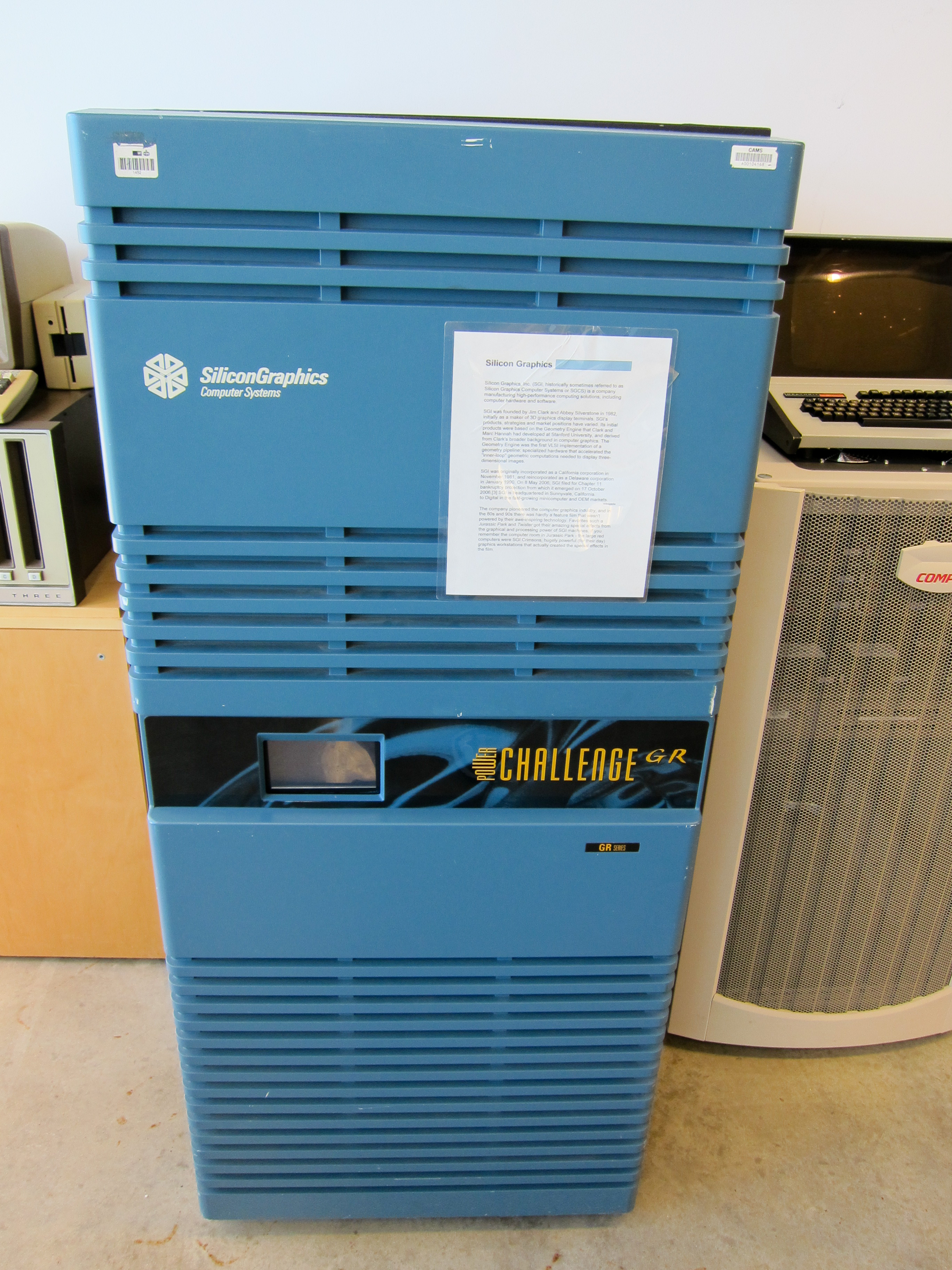 SGI Power Challenger GR